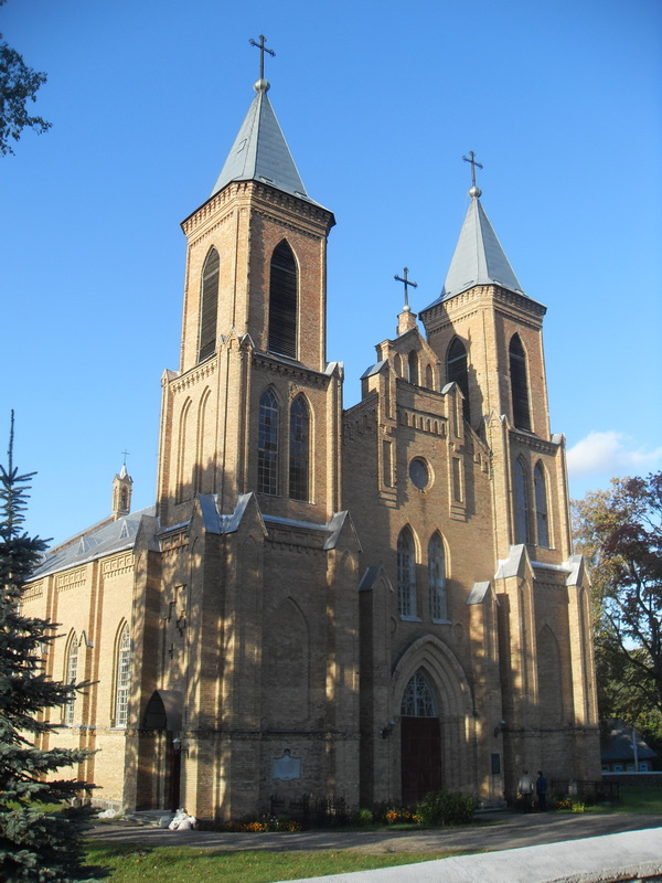 Трабы. Касцёл Раства Дзевы Марыі